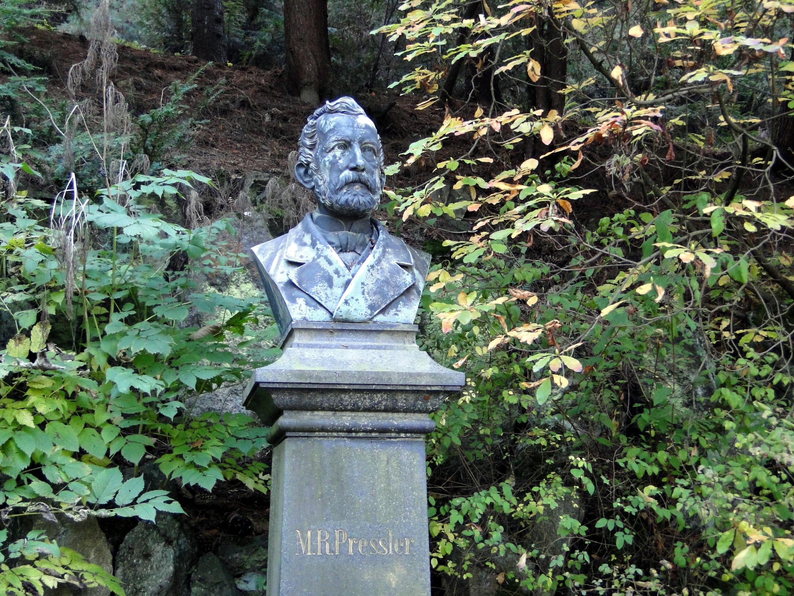 Statue von Max Robert Pressler im Forstbotanischen Garten Tharandt